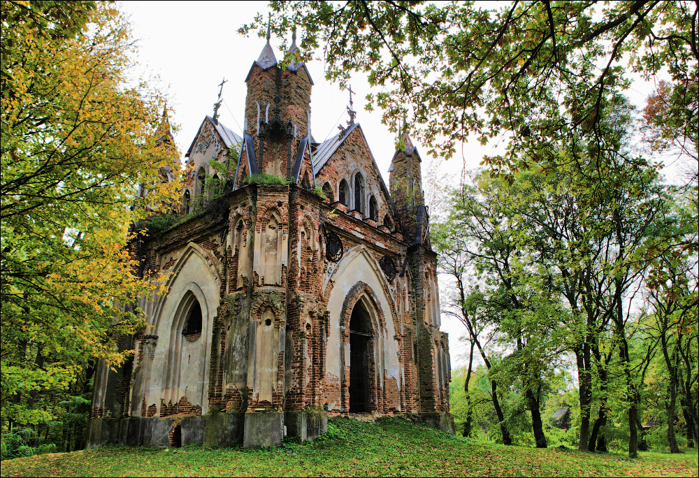 Закозель. Капліца-пахавальня